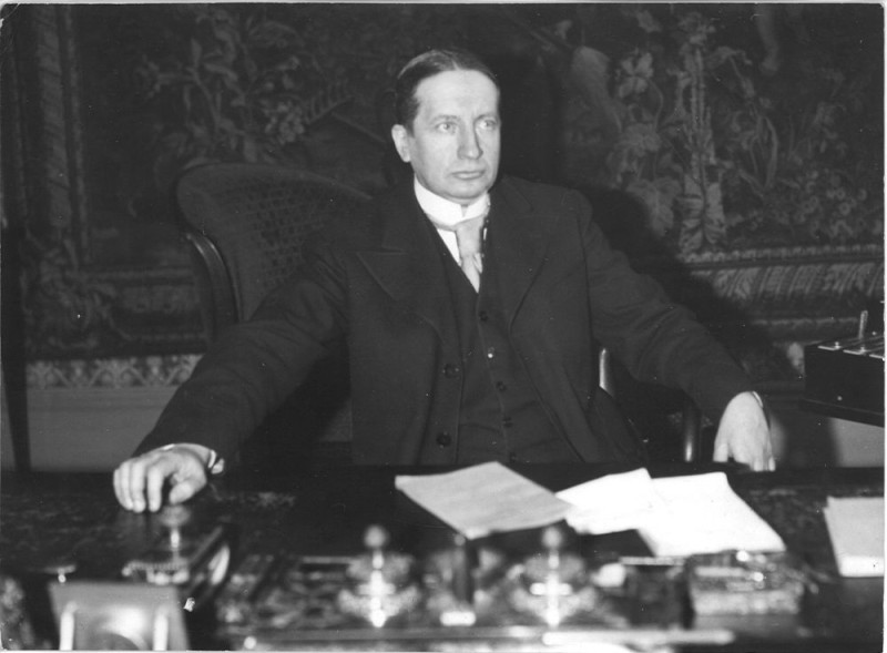 Georges Mandel, ministre des Postes, Télégraphe et Téléphone (PTT), photographié à son bureau.